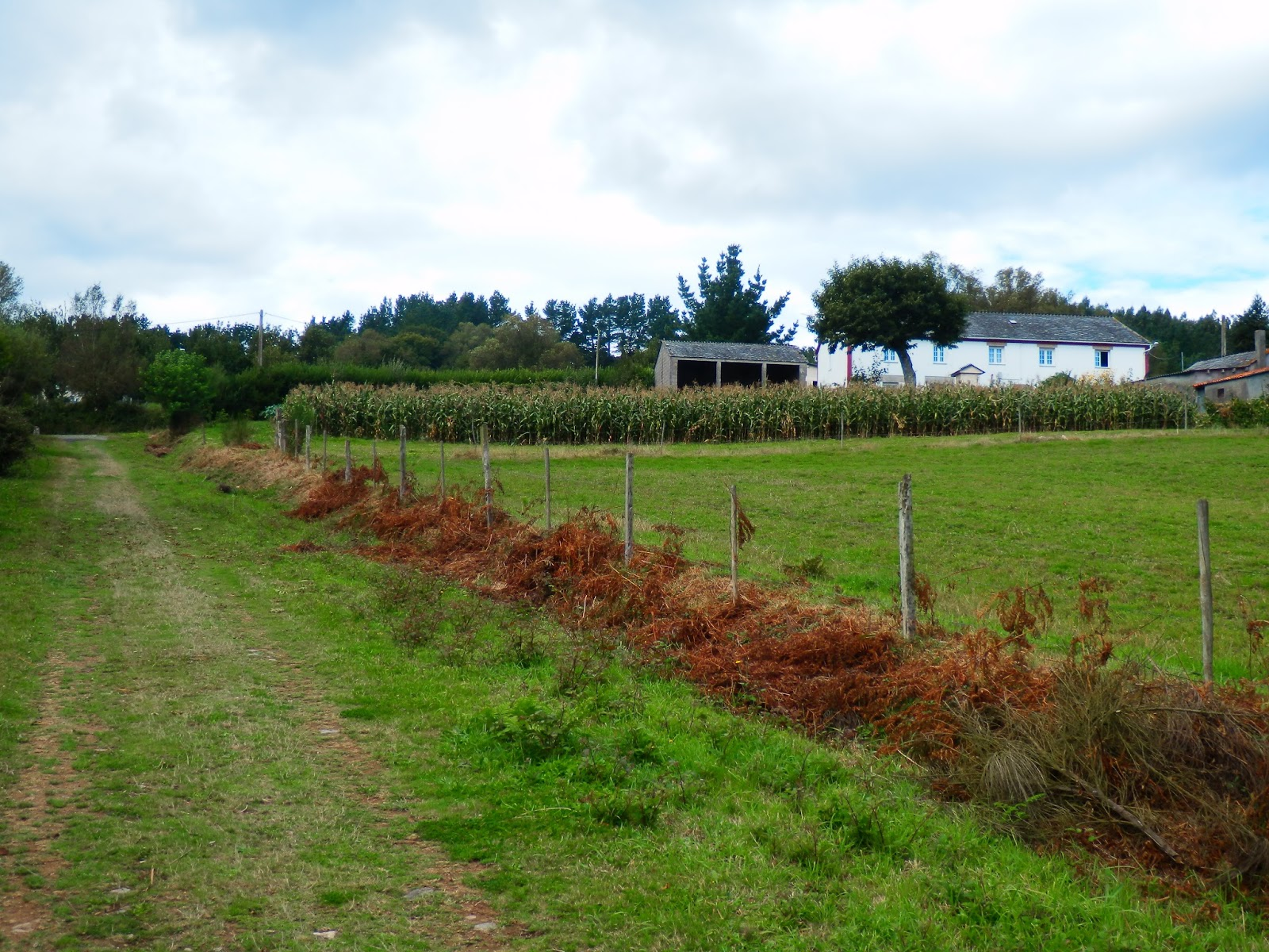 Ver título.